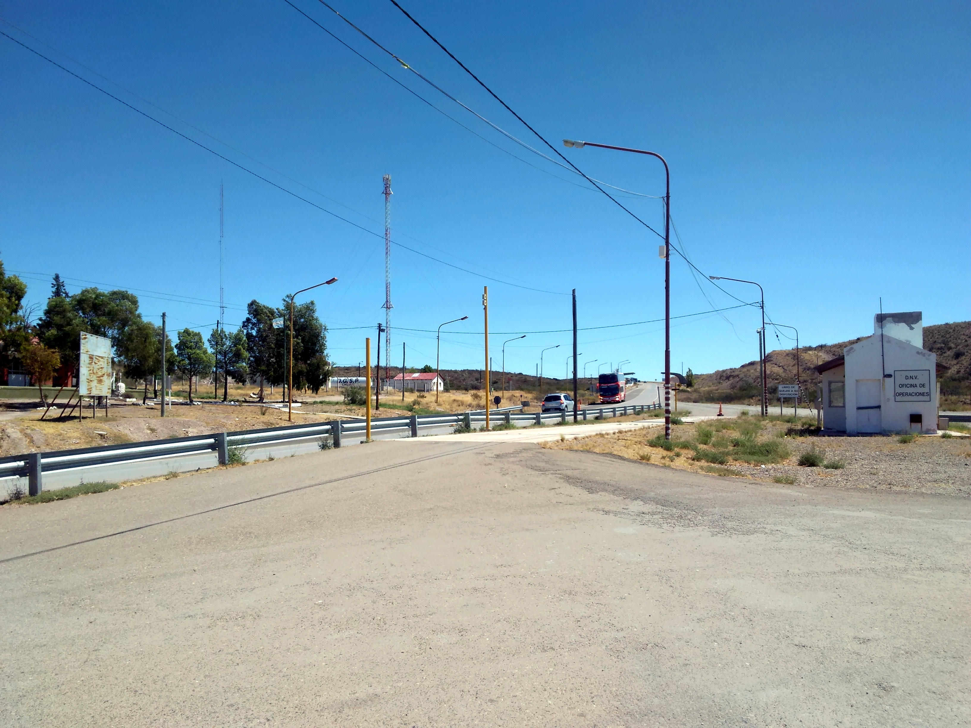 Vista panoramica de al locaidad